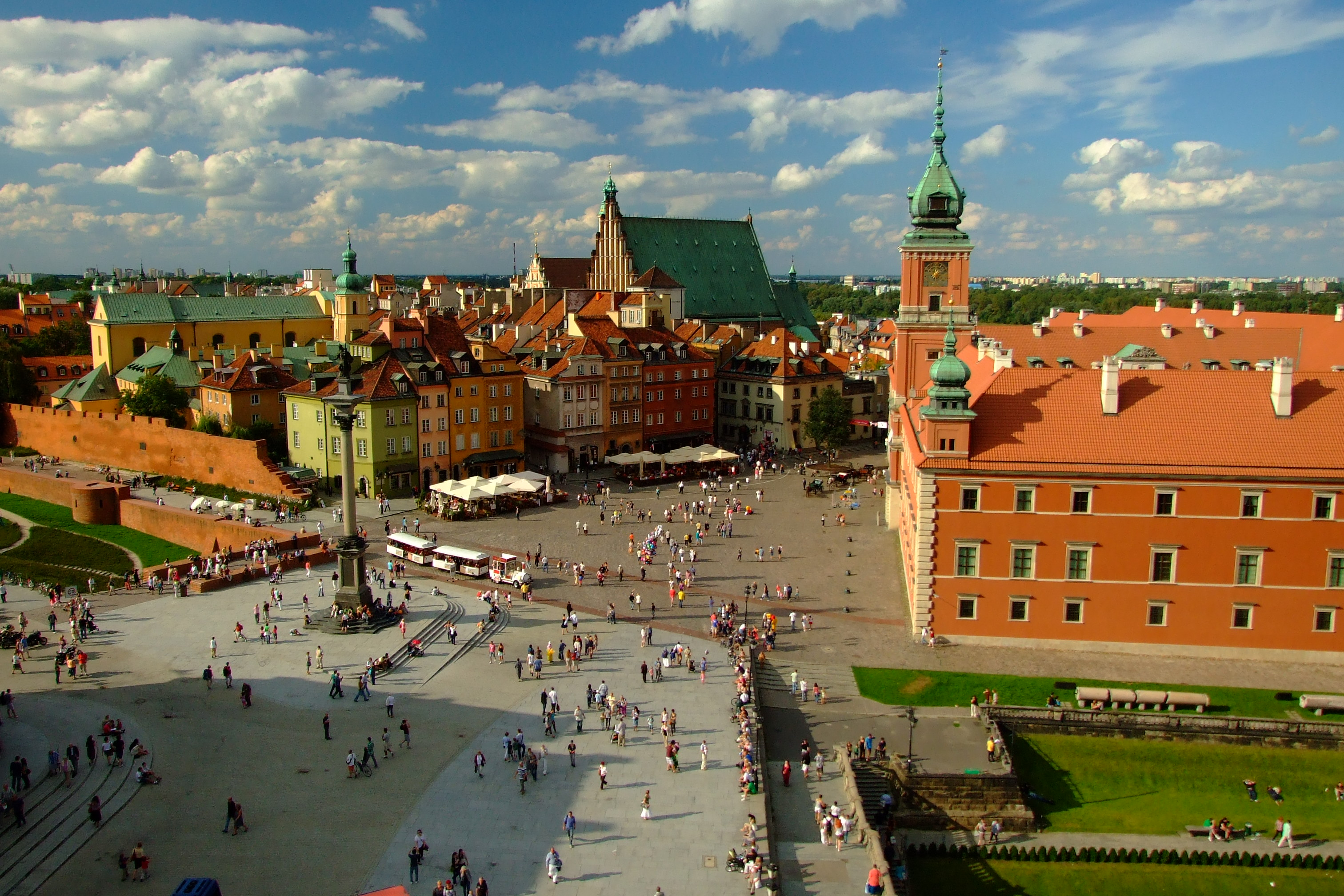 Plac Zamkowy w Warszawie.